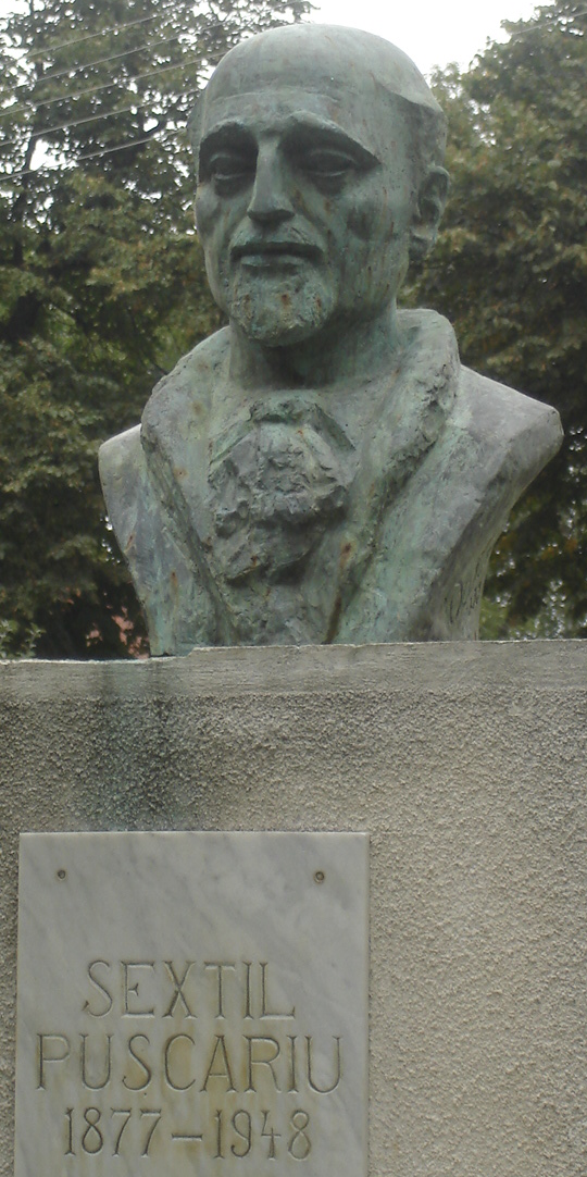 bust of Sextil Pușcariu, Romanian linguist